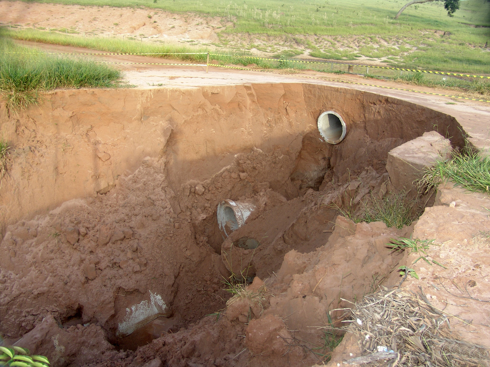 Voçoroca ou Boçoroca (iby=terra e soroc=fenda) em Avaré, Brasil. Localização geográfica: Lat. 23º12'24" sul e Long. 48º47'59" oeste